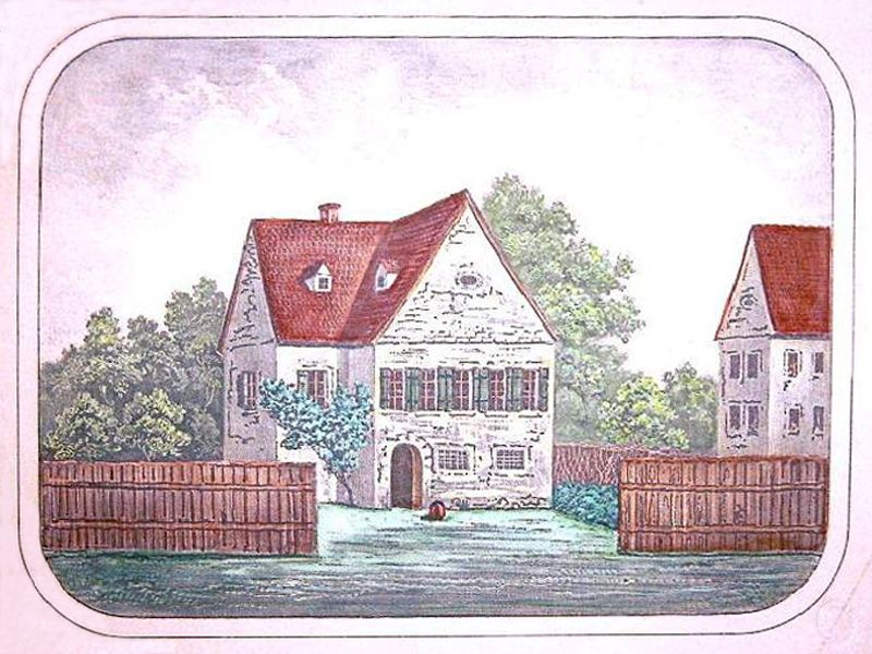 Das Oesersche Landhaus in Dölitz (kolorierte Lithographie)